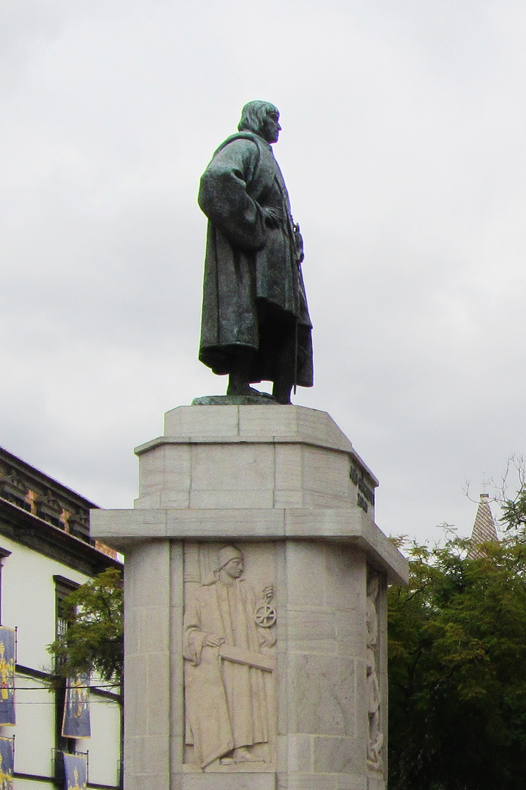 Monumento a João Gonçalves Zarco por Francisco Franco, 1927; Funchal, Madeira